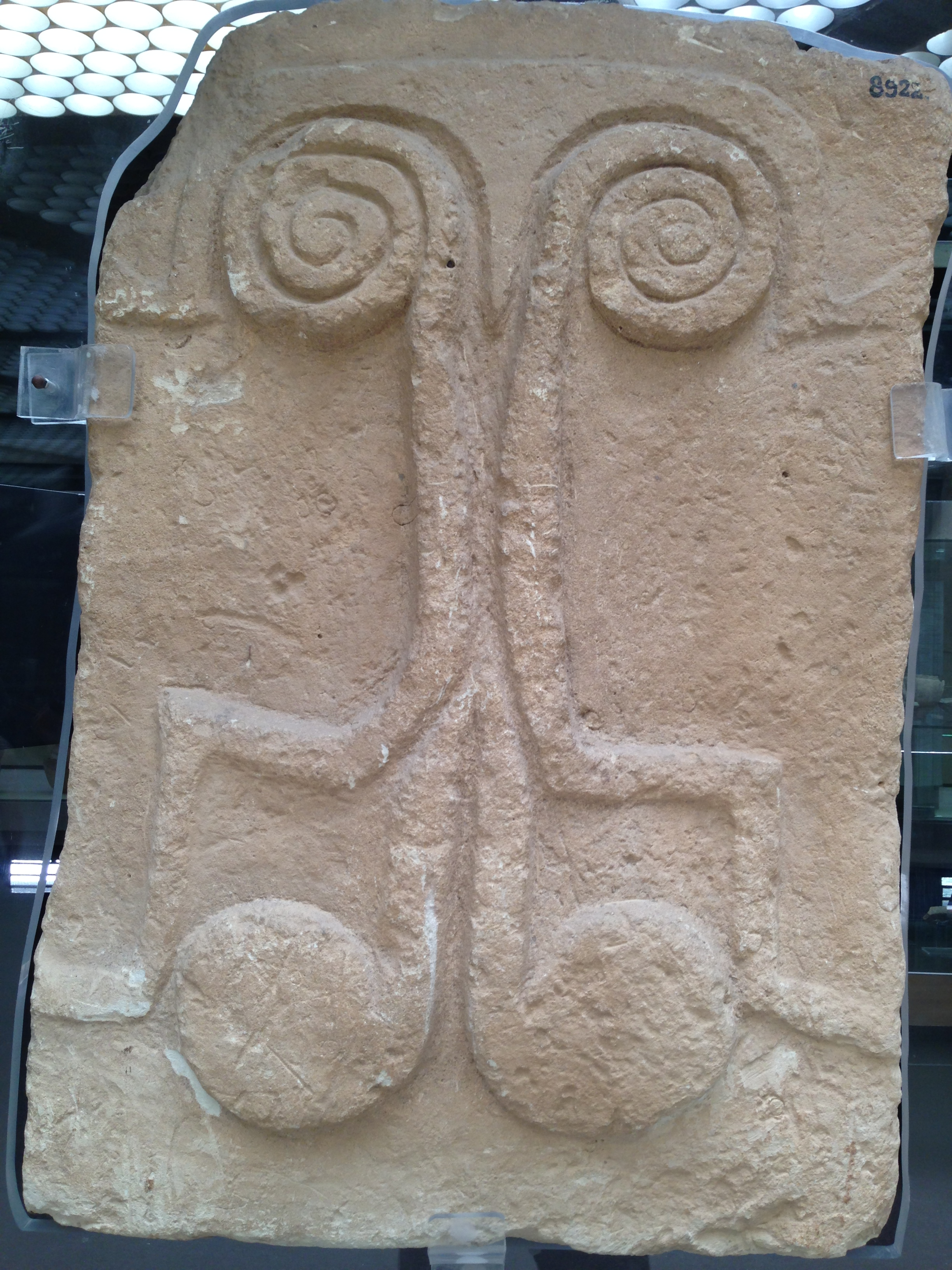 Portello tombale con motivo a rilievo interpretato come atto sessuale. XXII-XV secolo a.C.